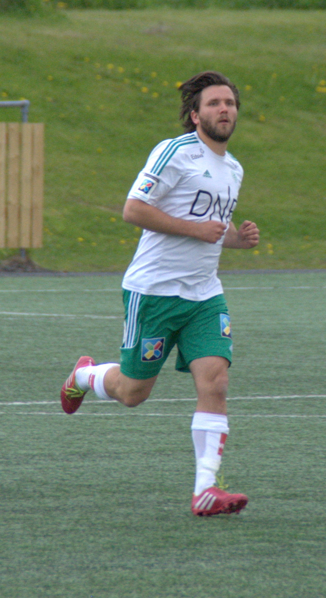 Marius Holt for Hamarkameratene